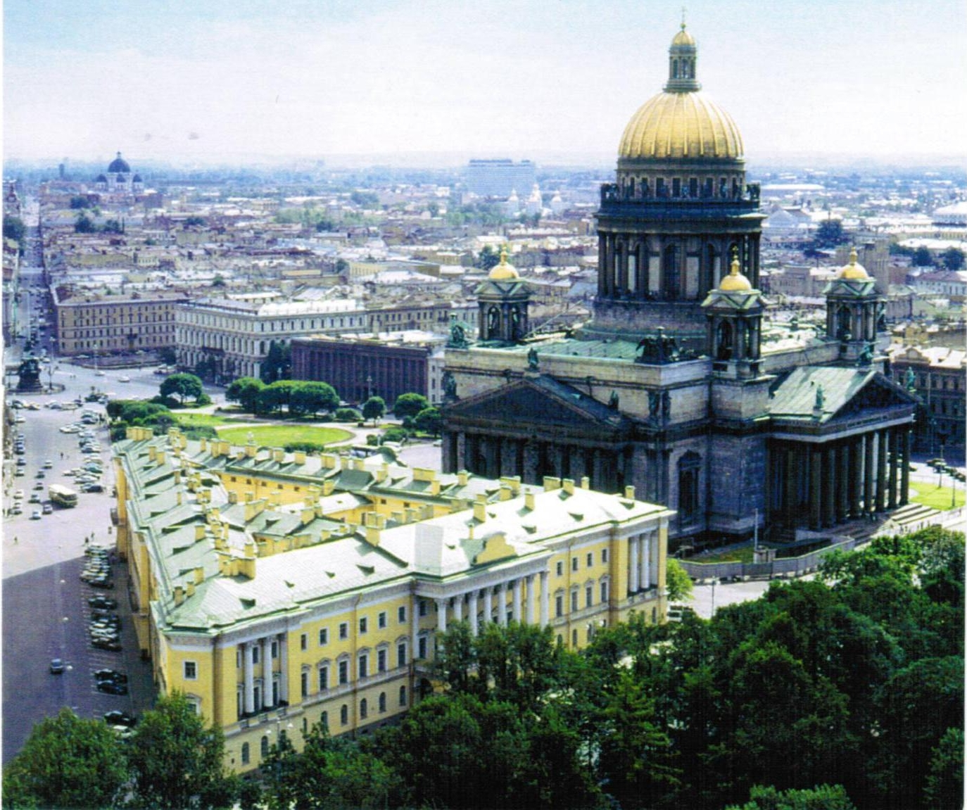 Дворец Лобановых-Ростовских в Петербурге